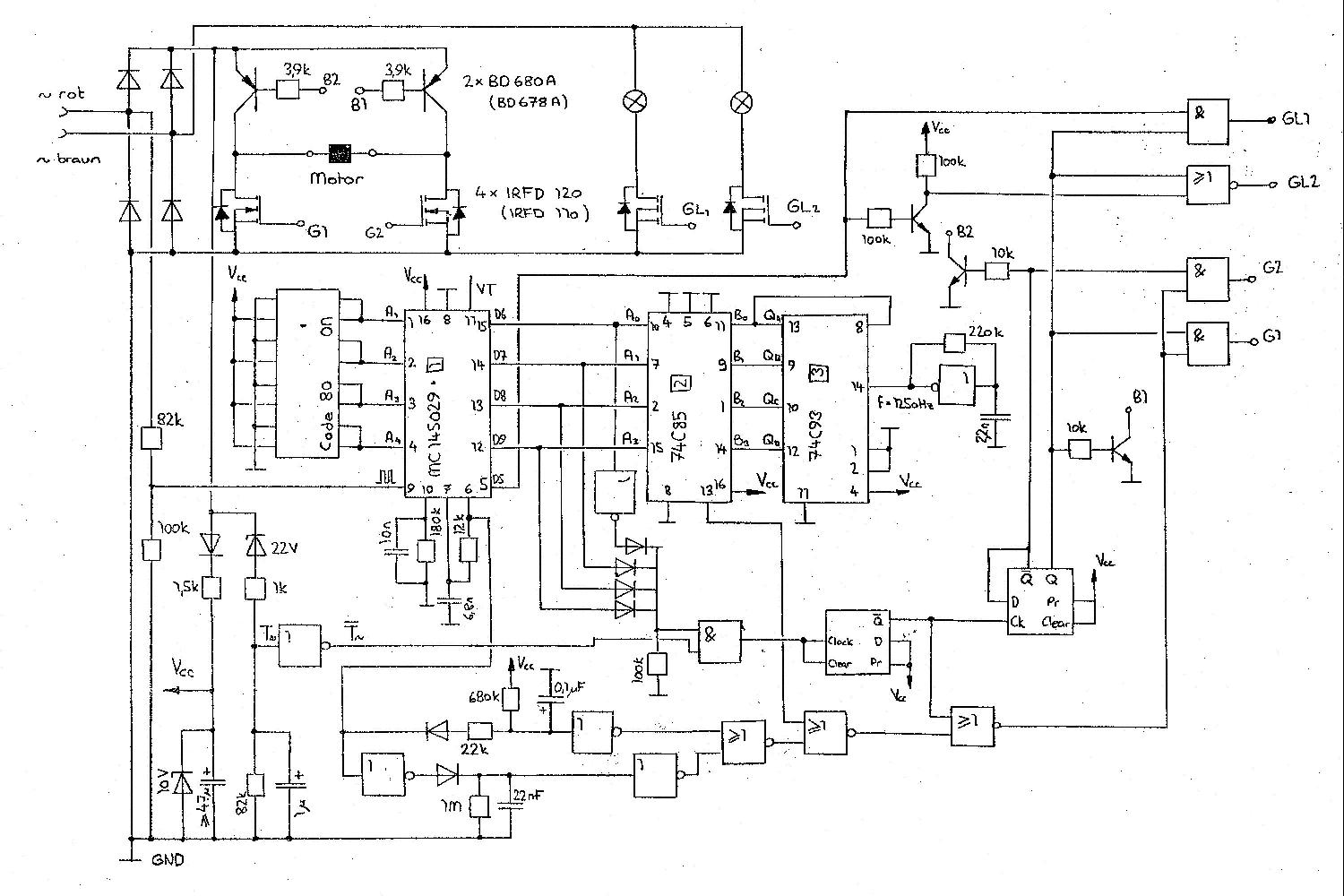 Bereits ein historisches Dokument bezüglich des Märklin Digital Systems vom März 1986. Schema eines von einem Studenten der Fachhochschule Biel entworfenen Dekoders für einen Gleichstrommotor.